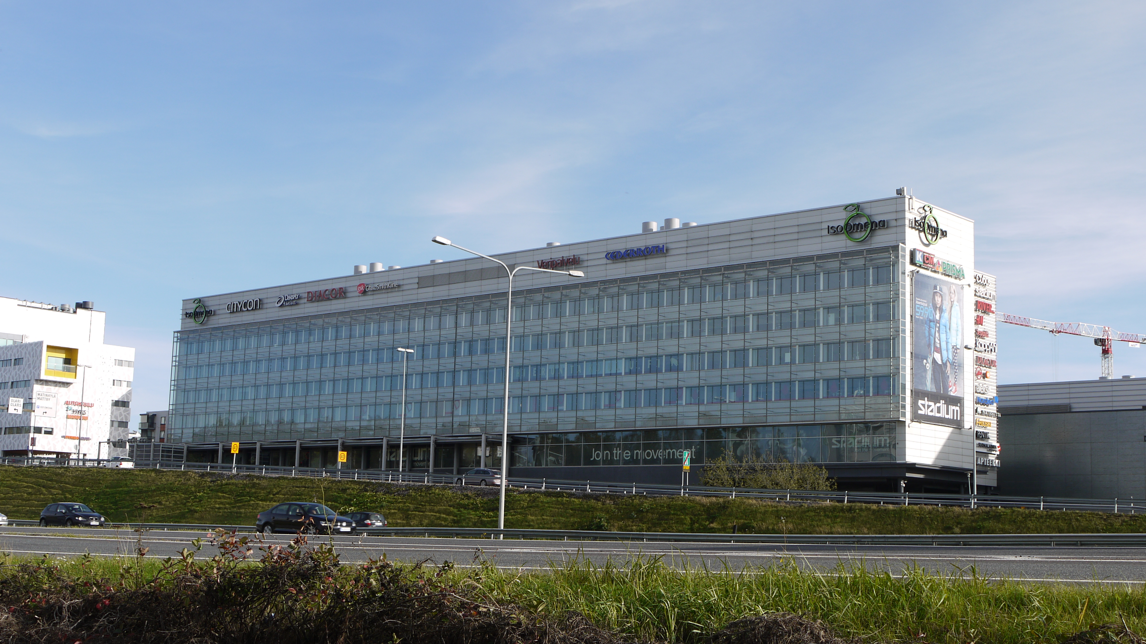 Kauppakeskus Iso Omena Länsiväylältä nähtynä